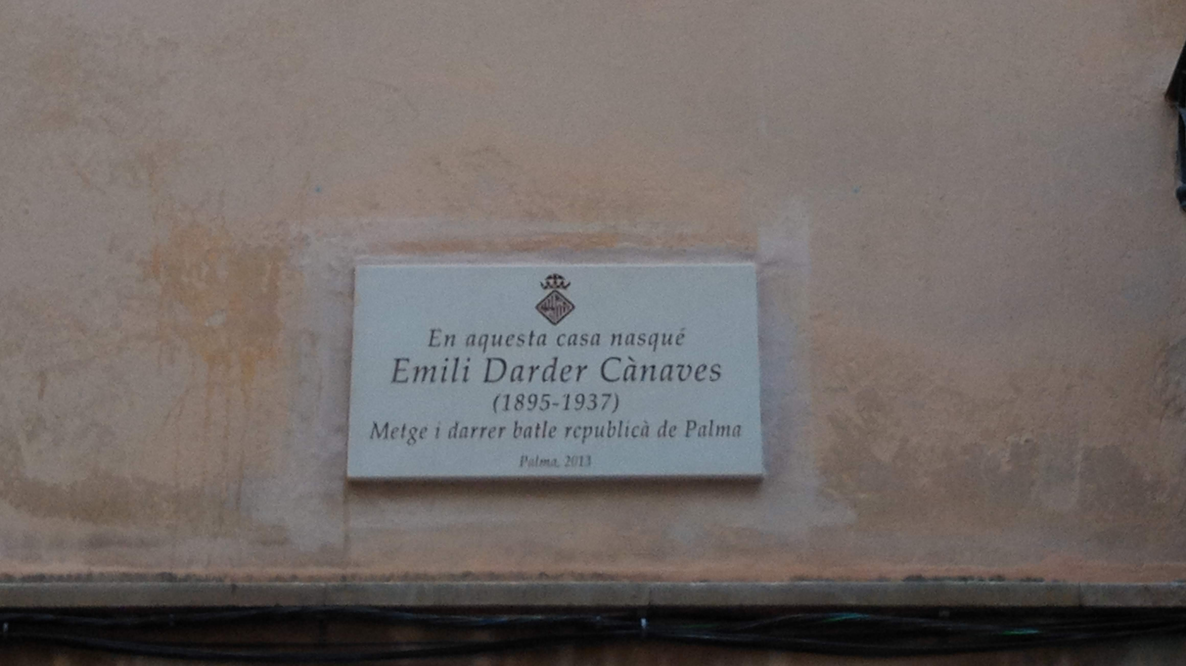 Aquesta placa recorda el lloc on va néixer Emili Darder Cànaves. Es troba a la façana de la casa, al carrer de Can Vatlori, al cap de cantó sud que forma amb el carrer de Can Martí Feliu. Diu així: «En aquesta casa nasqué Emili Darder Cànaves (1895-1937) Metge i darrer batle republicà de Palma. Palma, 2013.»